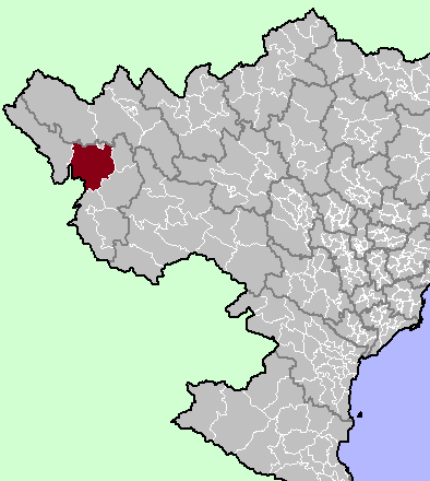 Muong Cha District, Dien Bien Province, Vietnam.